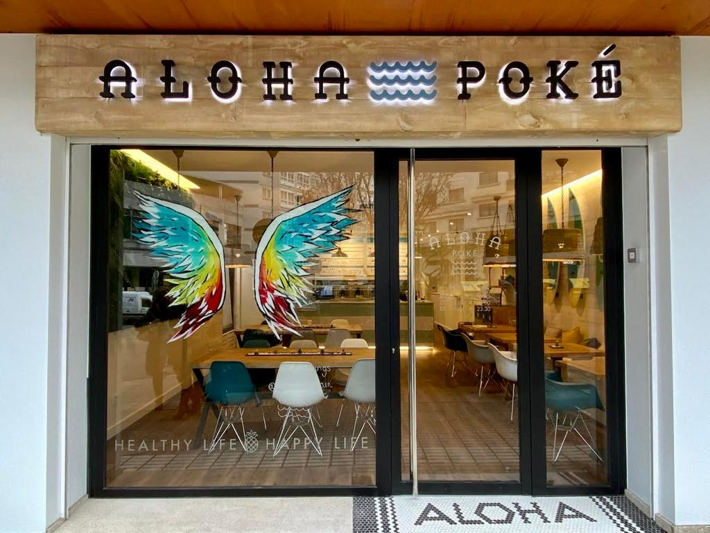 Fachada de un restaurante franquicia Aloha Poke